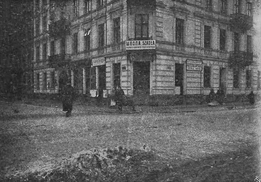 Dom przy ul. Żurawiej w Warszawie, gimnazium Tadeusza Sierzputowskiego (-1906)